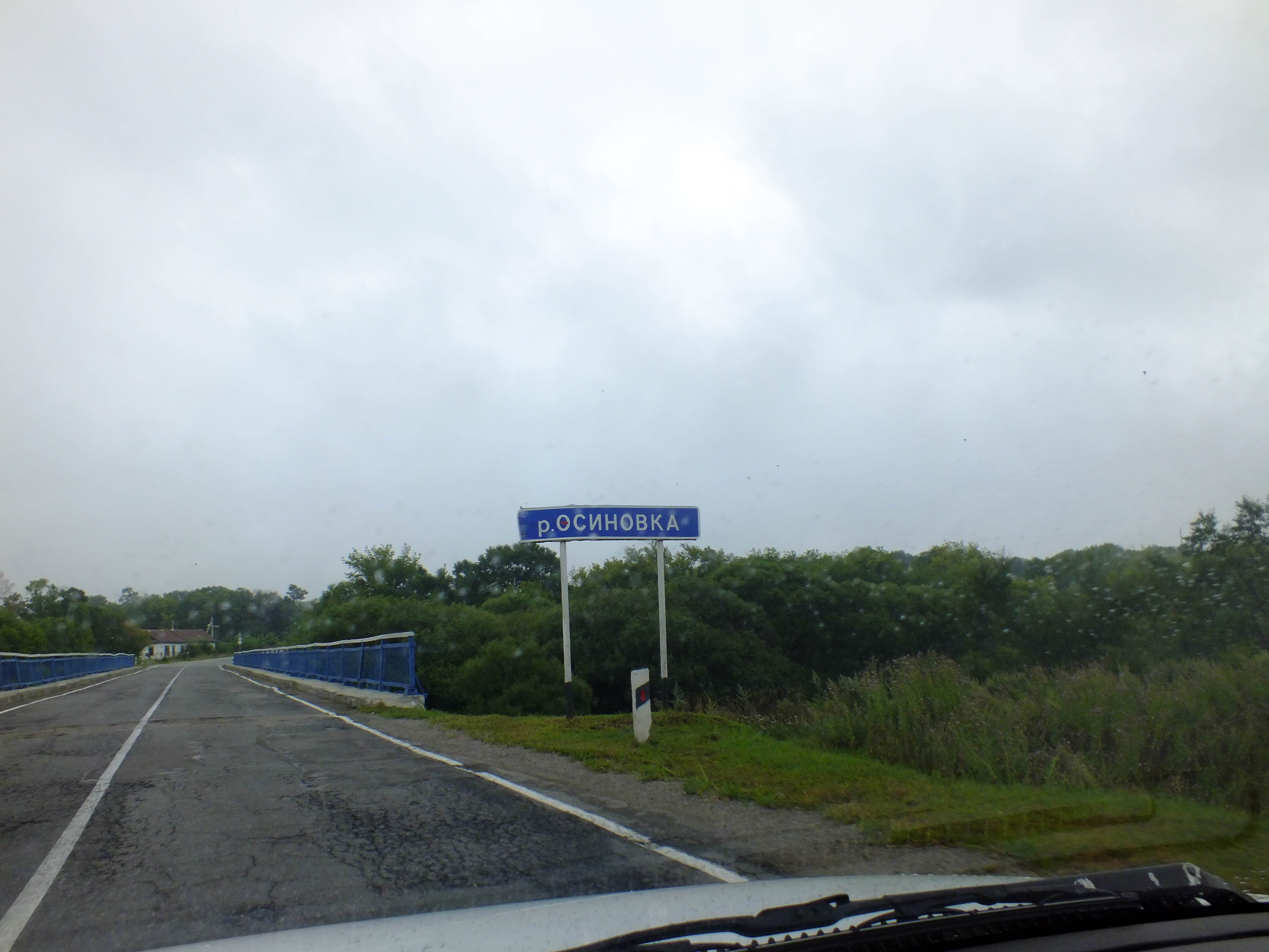 Река Осиновка Приморский край